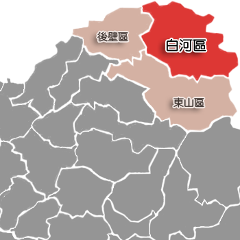 白河區相對位置。